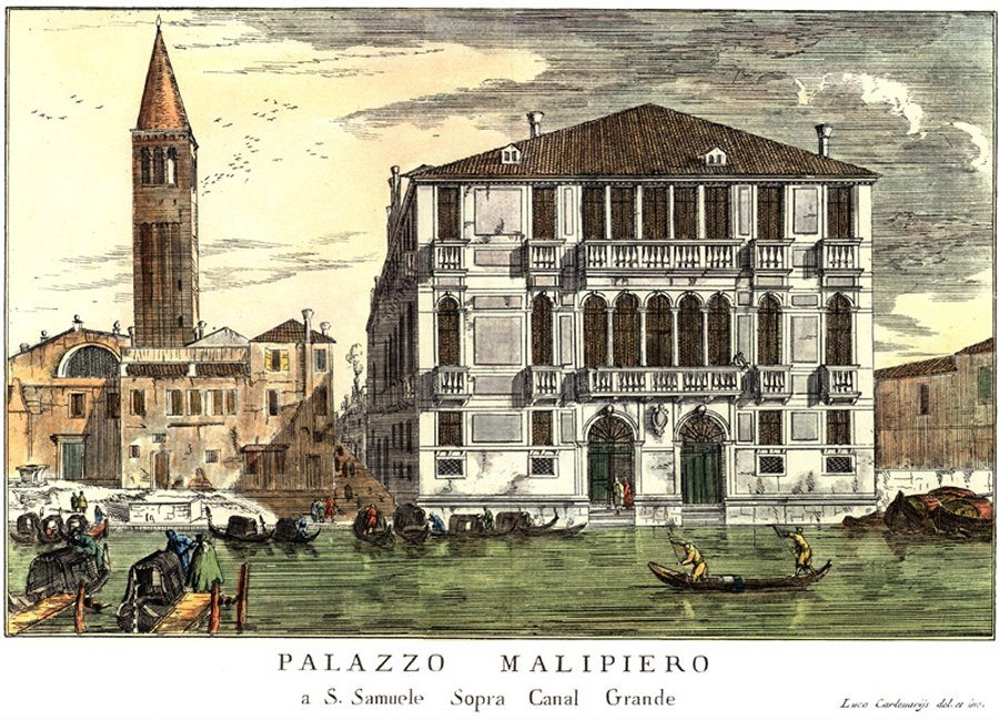 Palazzo Malipiero a San Samuele sopra Canal Grande. La veduta di Palazzo Malipiero a San Samuele è parte dell'ampia raccolta di incisioni con le vedute dei più importanti palazzi veneziani